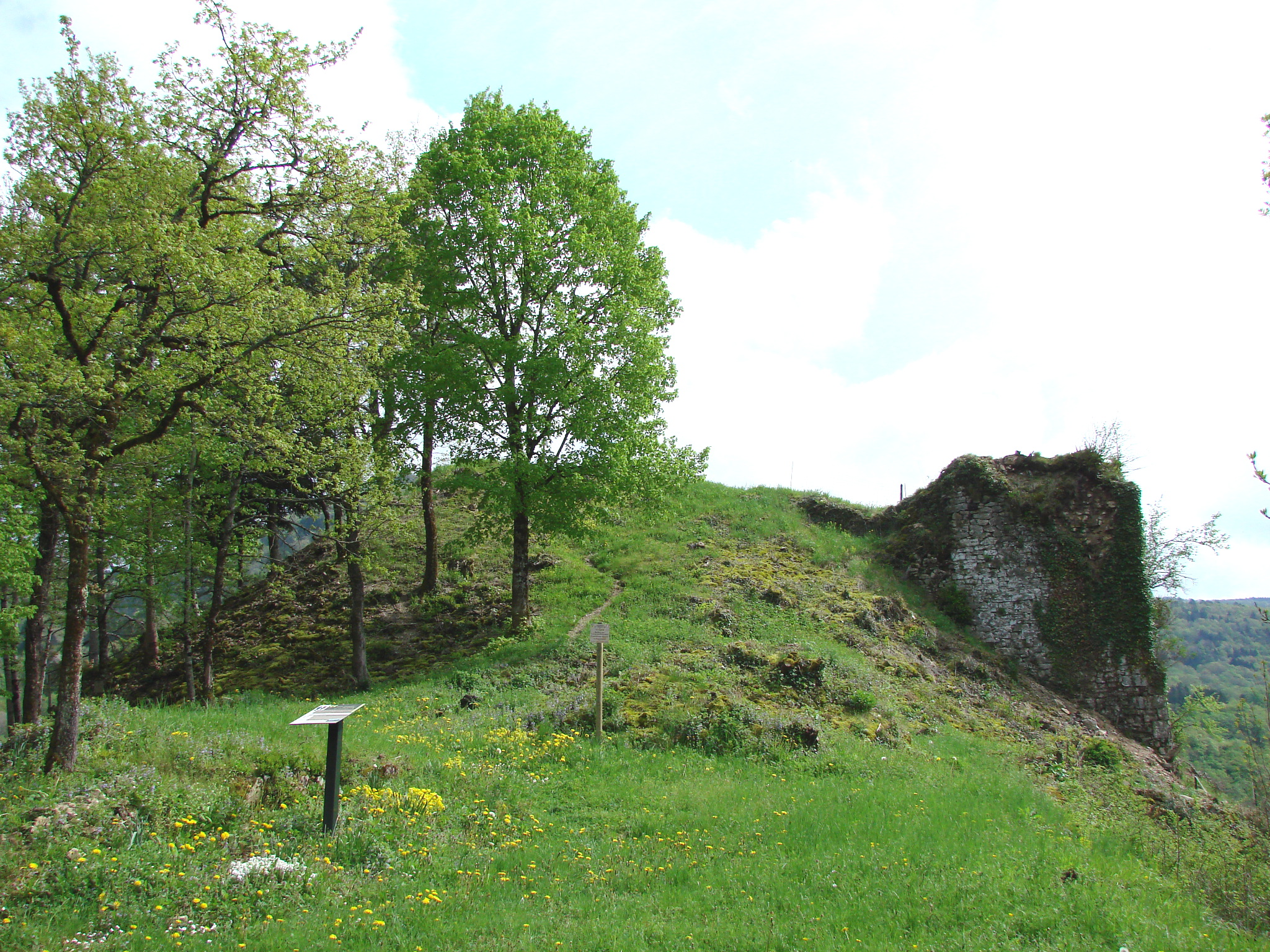 Ruine du Château de Cornillon de Saint-Rambert-en-Bugey: ici se trouvait la barbacane